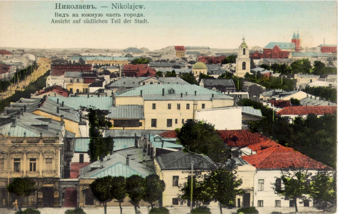 „Nikolajew. Ansicht auf südlichen Teil der Stadt.“